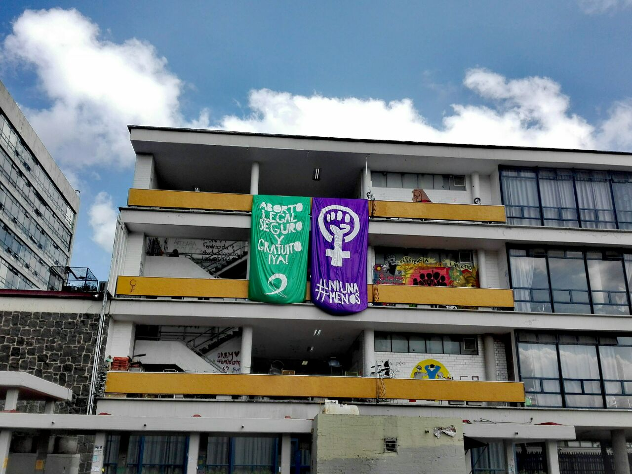 Mantas por paro feminista y separatista en la Facultad de Filosofía y Letras de la UNAM en protesta por la falta de respuesta de las autoridades a las denuncias de violencia sexual en la universidad.